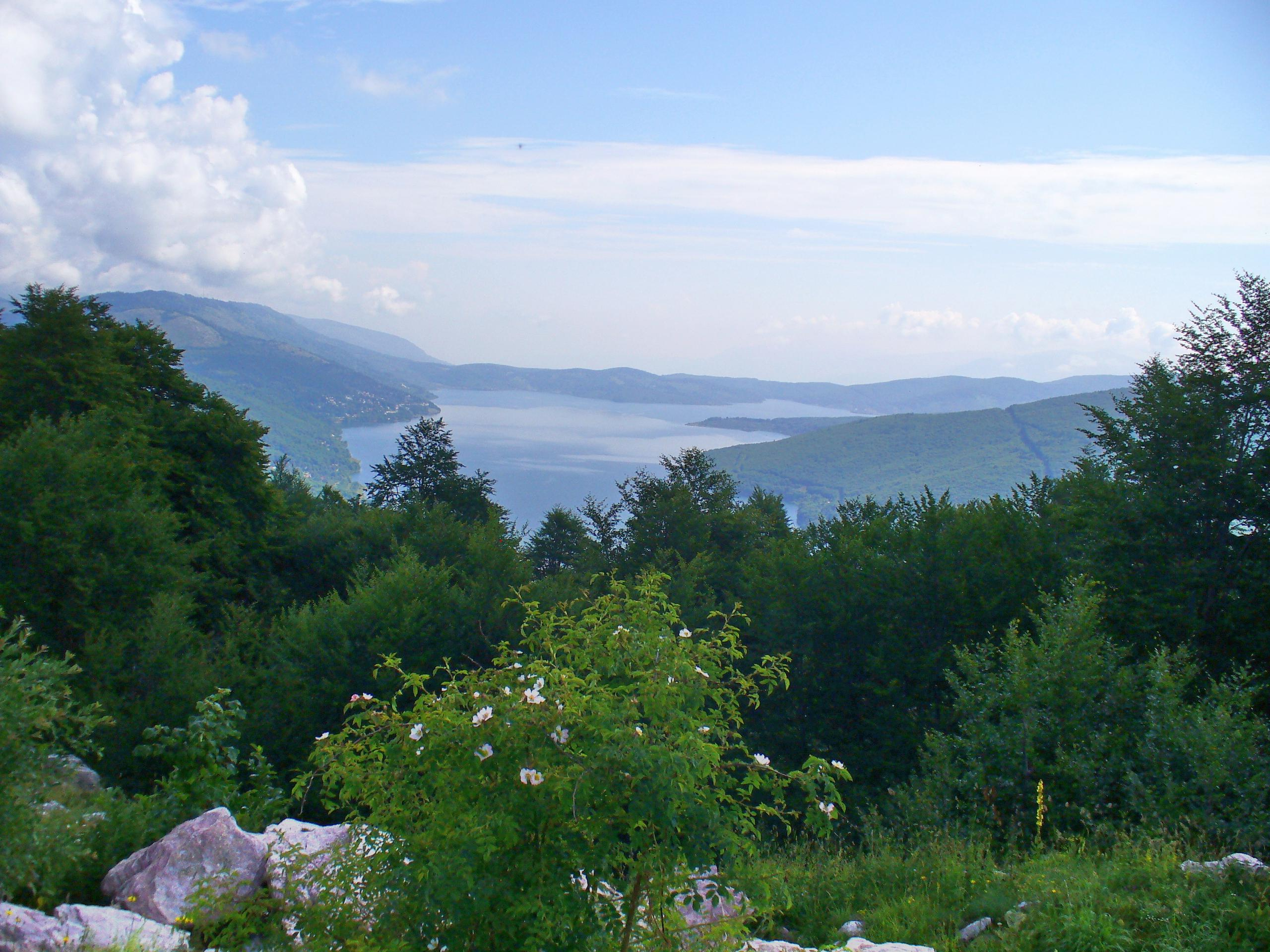 Мавровско езеро, Поглед одозгора